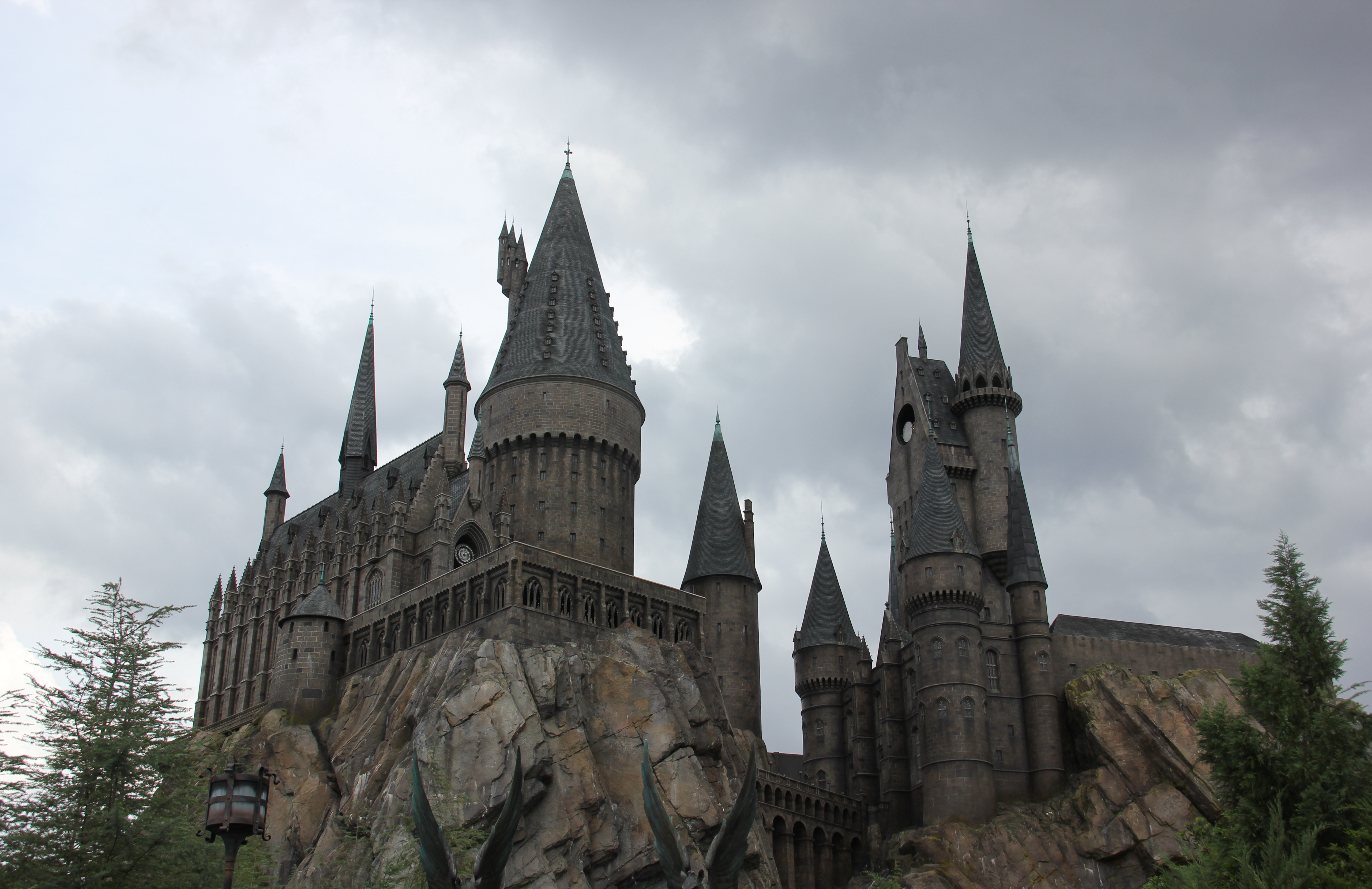 Universal Studios